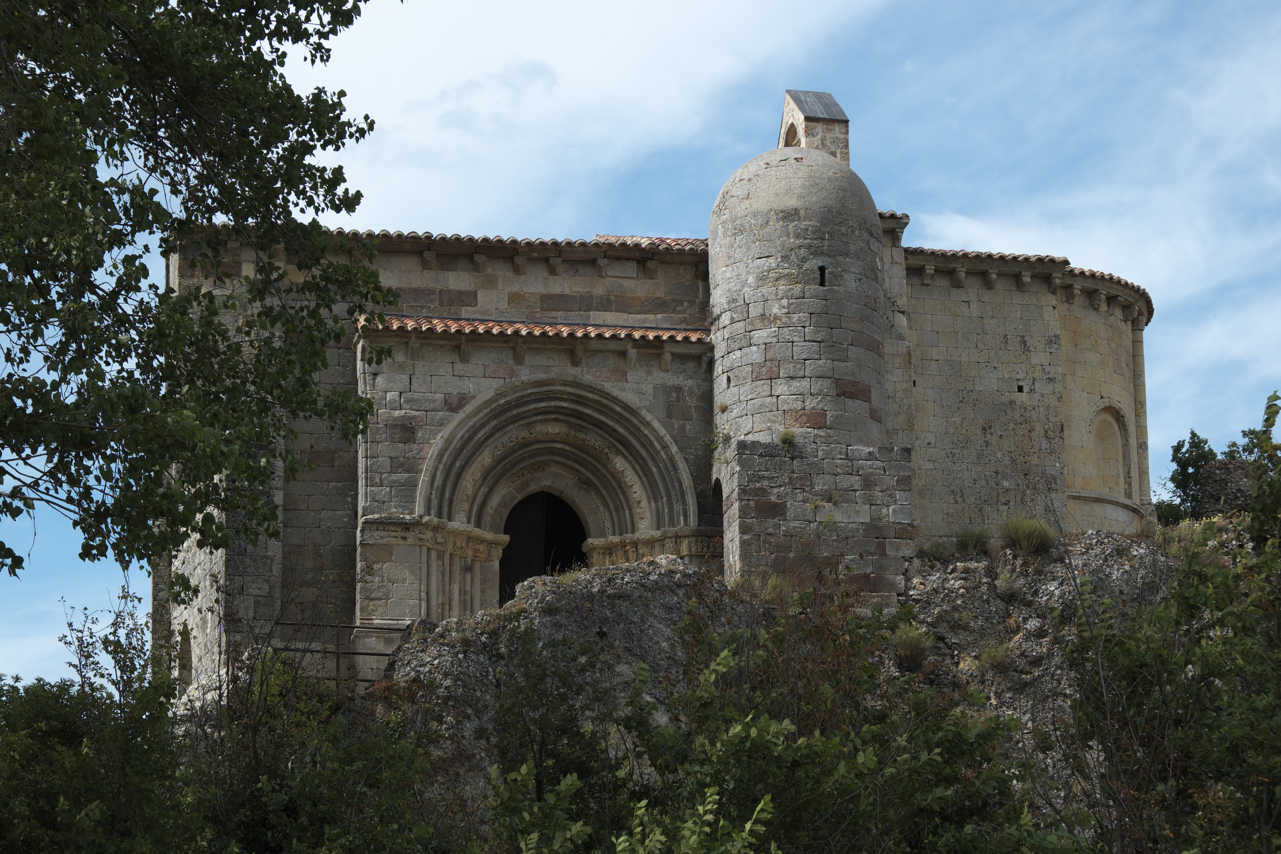 Ermita de Santa Cecilia in Vallespinoso de Aguilar in der Provinz Palencia (Kastilien-León/Spanien), Ansicht von Süden